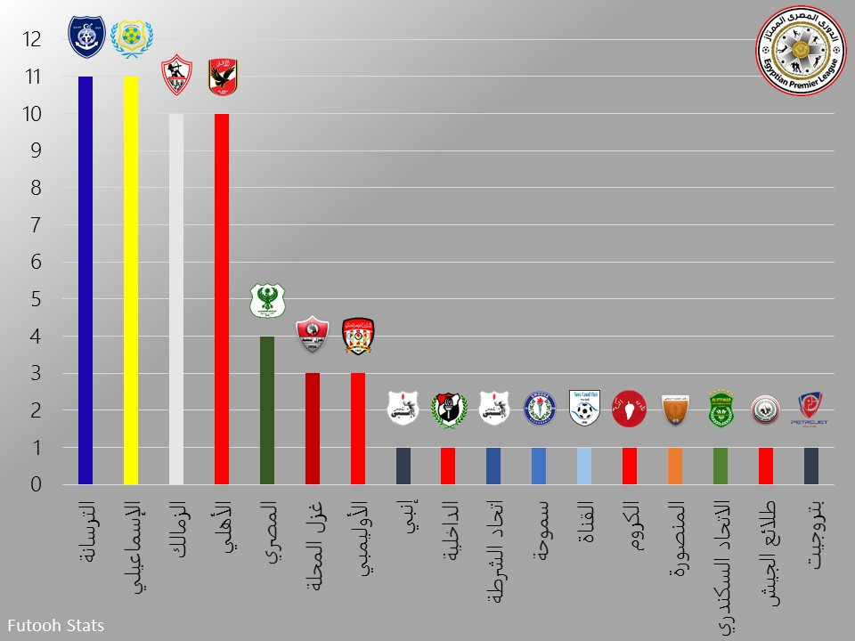 فرق هدافي الدوري المصري الممتاز لكرة القدم